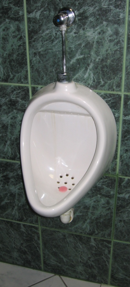 Urinal